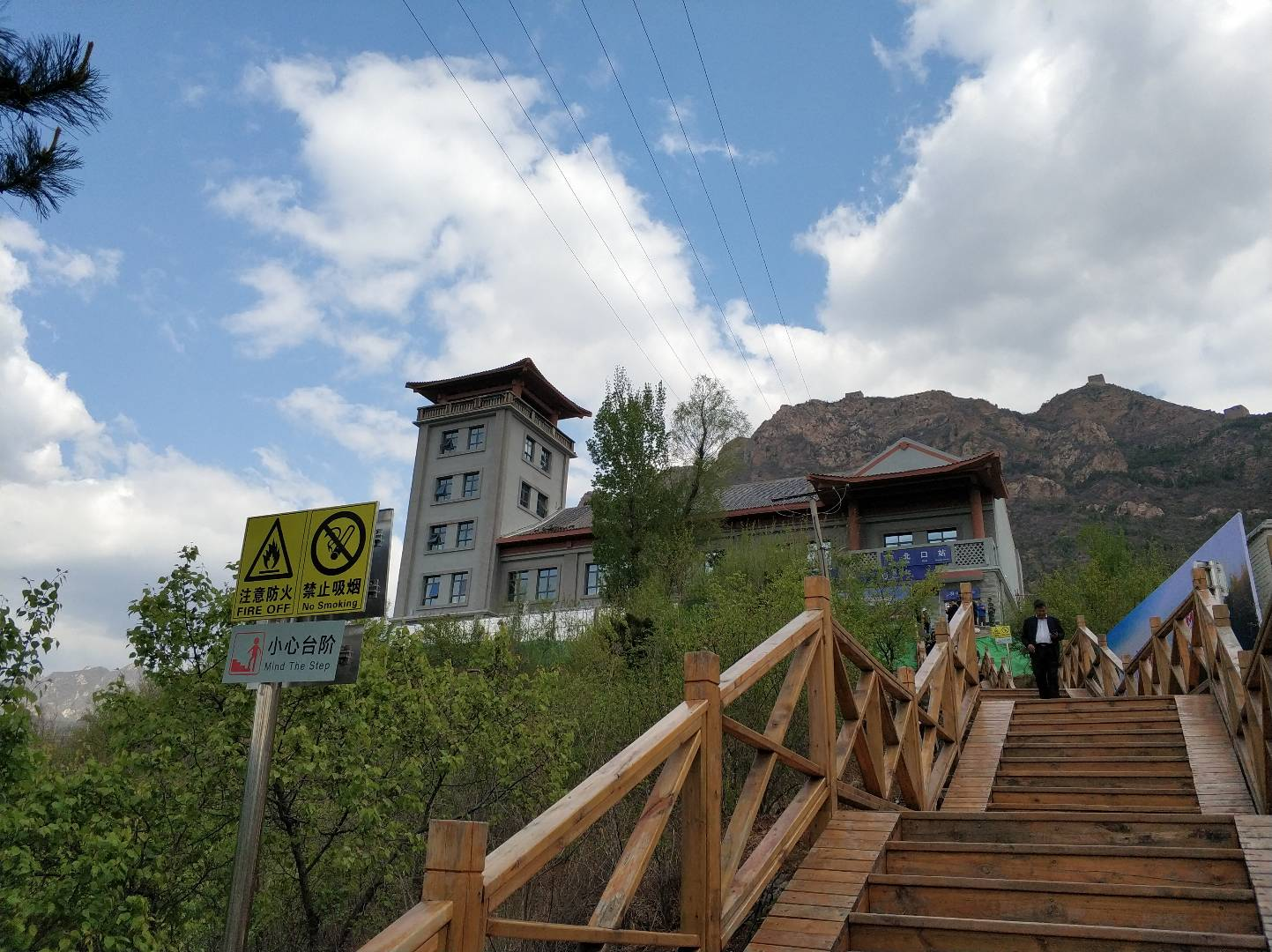 中文（中国大陆）: 古北口站开办客运首日